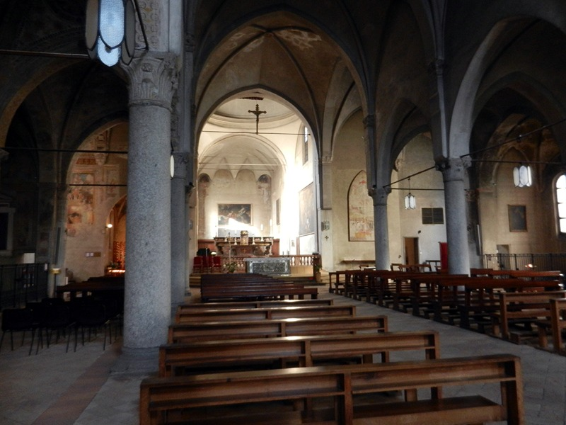 Milano - Interno della Chiesa di S. Pietro in Gessate